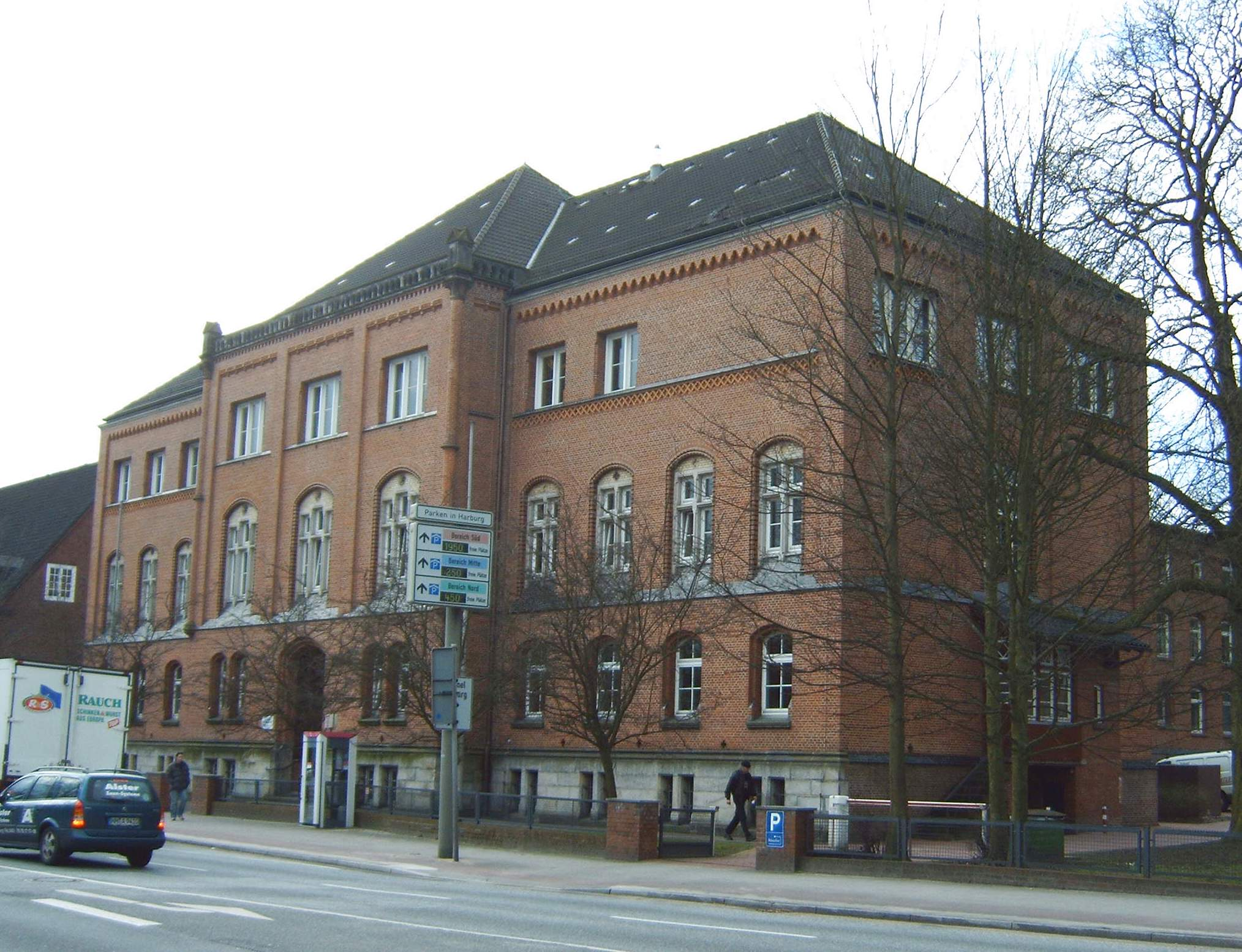 Gebäude des Amtsgerichts Hamburg-Harburg (Deutschland) aufgenommen am 6.4.2006 Urheber: Olaf Meister